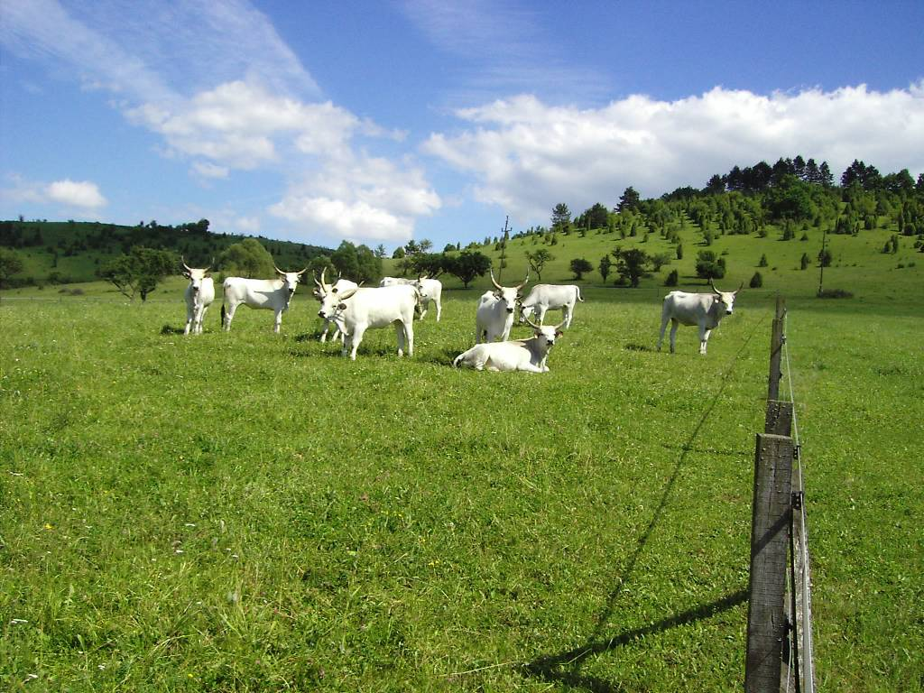 Narvalo 17:17, 22. Nov 2006 (UTC)